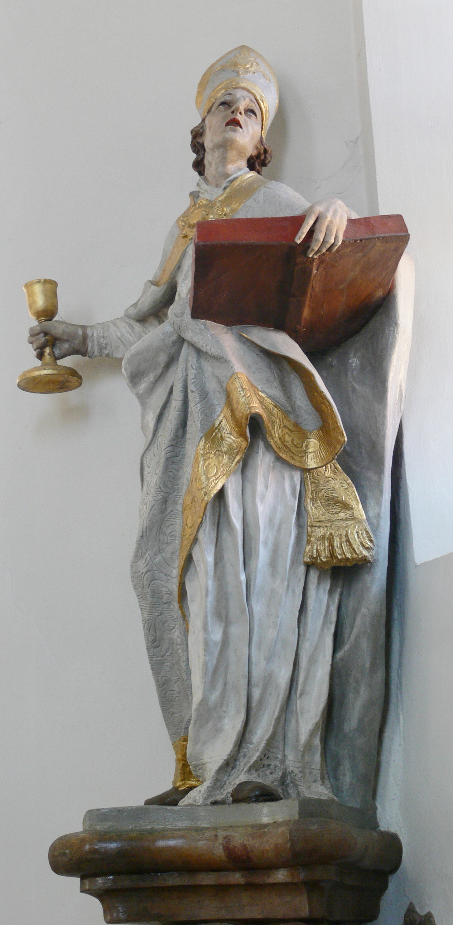 Pfarrkirche St. Konrad und Vinzenz, Fronhofen, Gemeinde Fronreute, Landkreis Ravensburg Hochaltar: Kirchenpatron Konrad von Konstanz